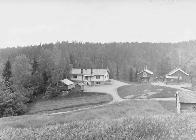 Sarabråten, 1880-tallet.